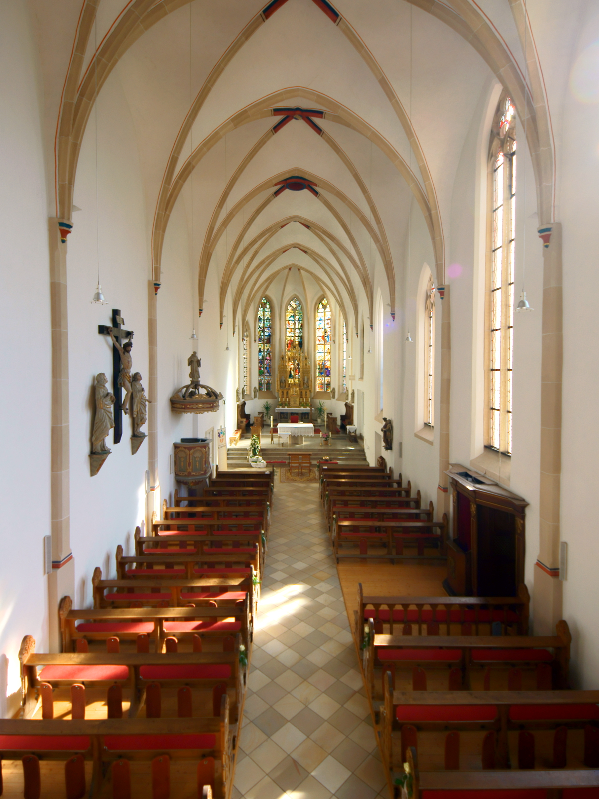 Die Kirche St. Marien in Burlo (Stadt Borken, Nordrhein-Westfalen) ist die Kirche des Oblatenklosters Mariengarden und Schulkirche des gleichnamigen Gymnasiums. Die ältesten Teile des ursprünglich wilhelmitischen Baus stammen aus der Zeit um 1300. This is a photograph of an architectural monument. A1 - A 26